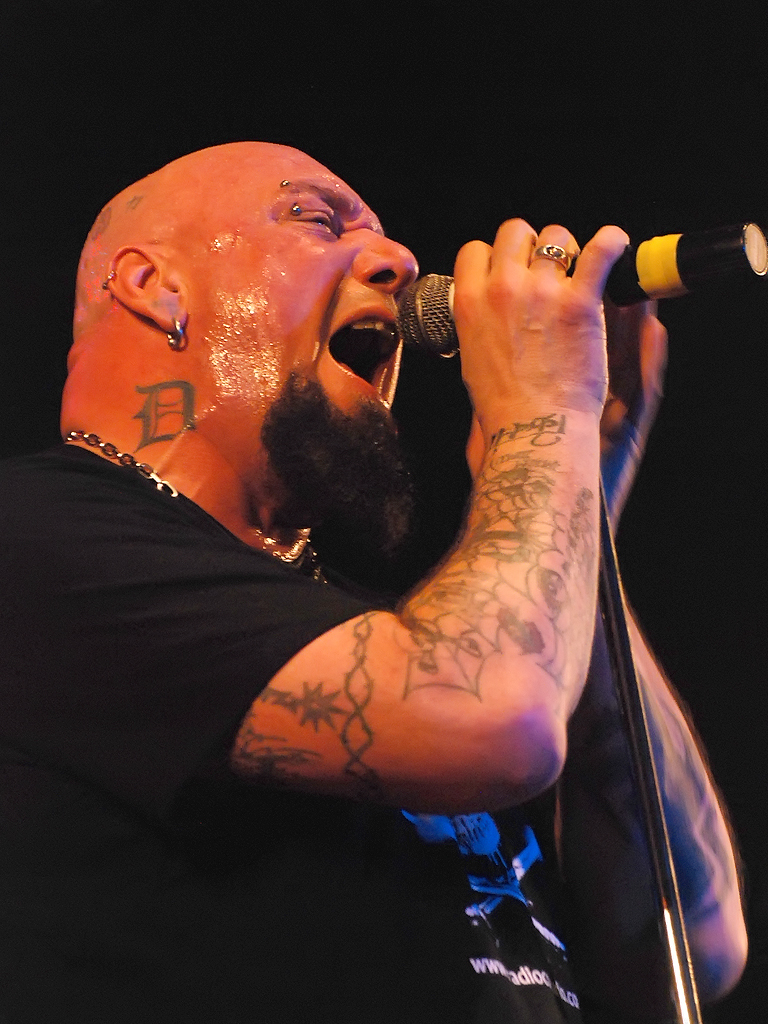 Foto: Natalia Bezerra.